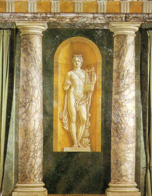 Fresko im Salon der Musen des Schlosses O in der Normandie